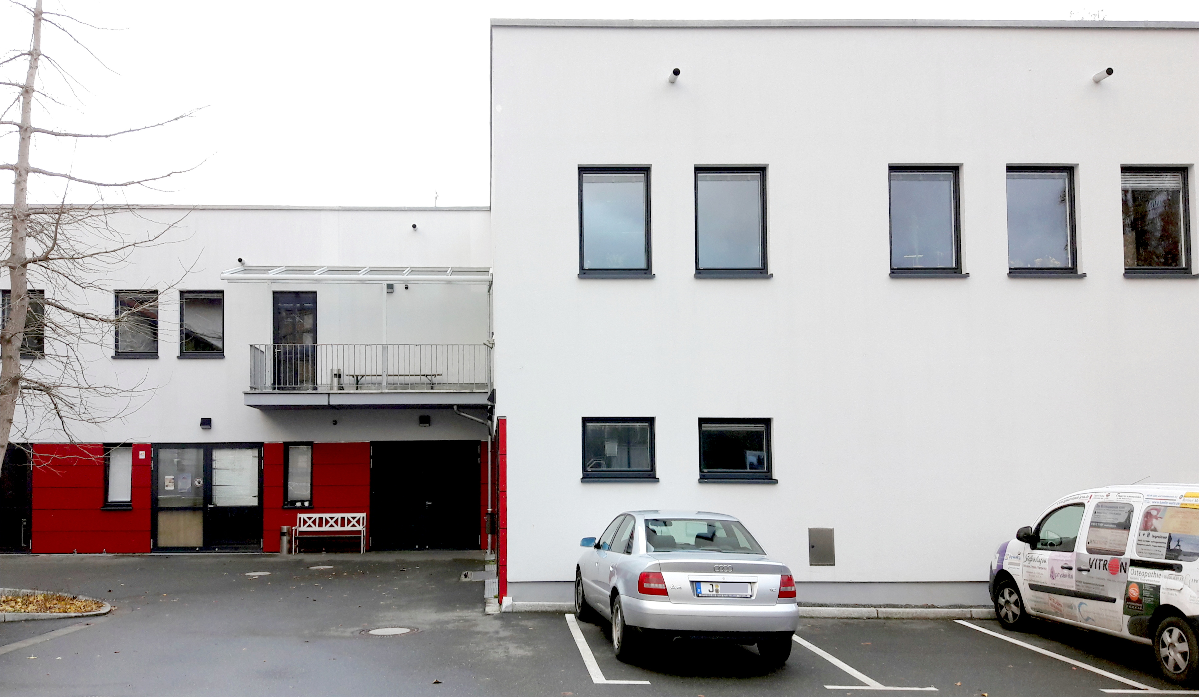 Funktionsanbau des Theaterhauses Jena am 14. Dezember 2019, vom Schillergässchen aus gesehen